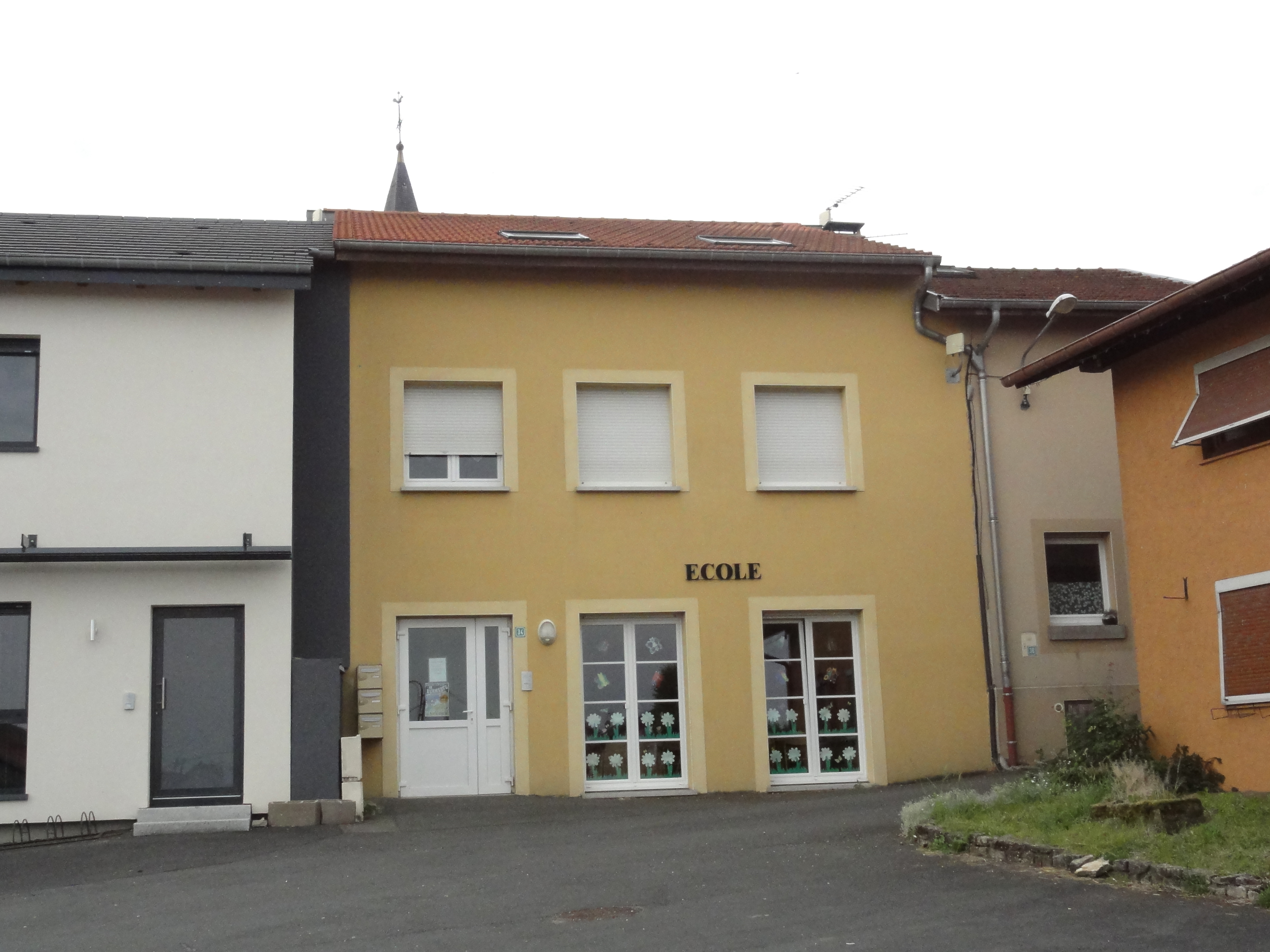 Kerprich-aux-Bois (Moselle) école